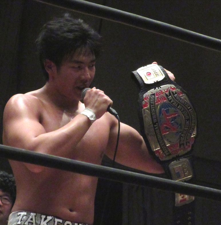 2016.5.29後楽園ホール